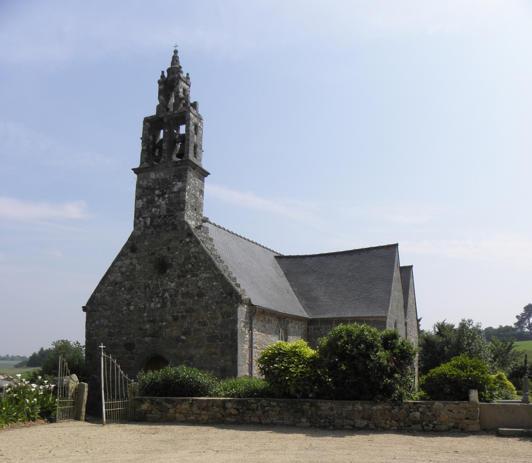 Église Saint-Ézéchiel de Lanvézéac sise commune de Caouënnec-Lanvézéac (22). Façade occidentale et flanc sud.